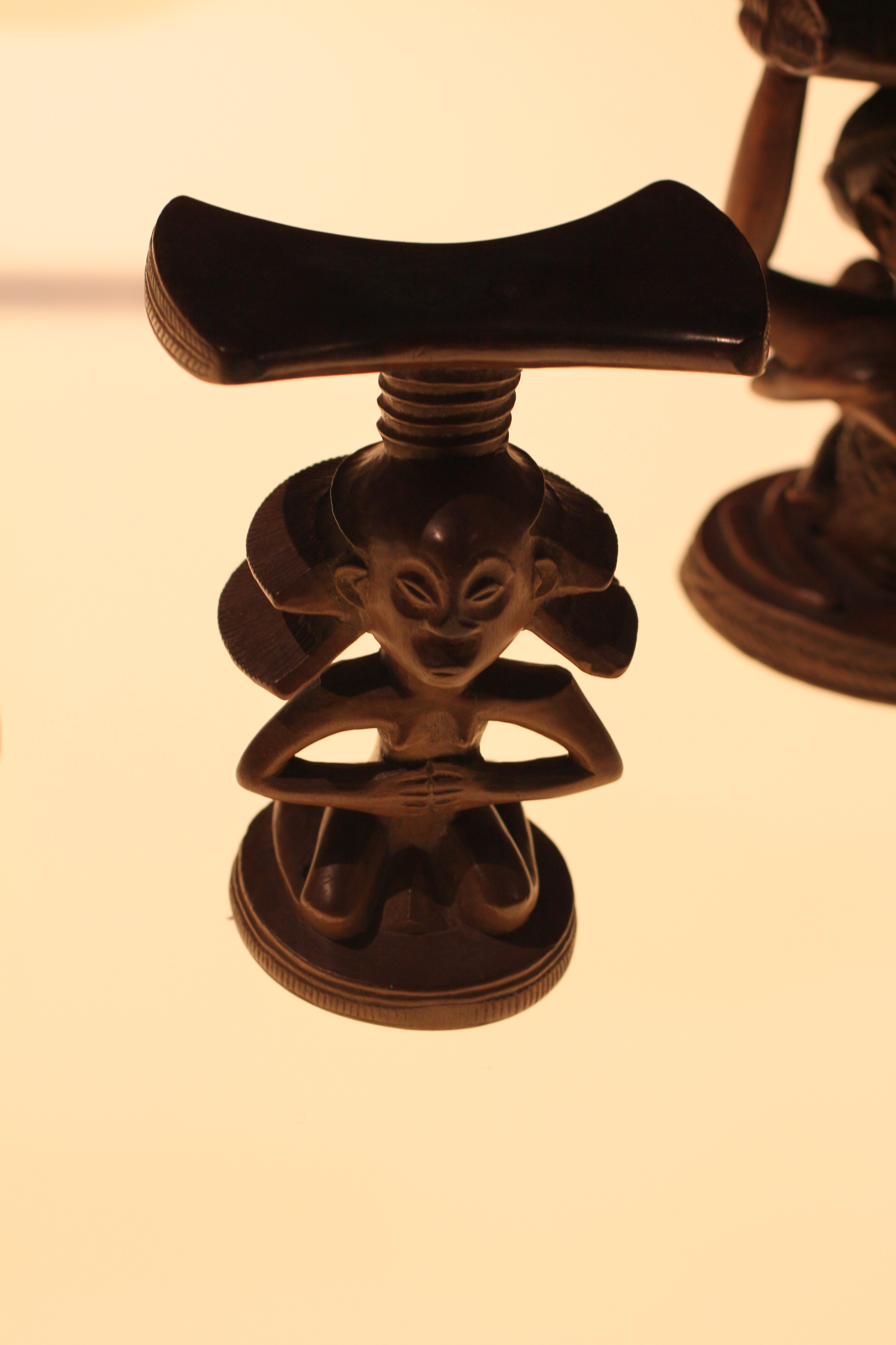 Nackenstütze im Shankdai-Stil, vom Meister der Kaskadenfrisur, Demokr. Rep. Kongo, Luba, Holz, 19. Jh. oder frühes 20. Jh.; Afrikaabteilung, Ethnologisches Museum, Berlin, Inv. Nr. III C 19987 (Sammlung Leo Frobenius, erworben 1904)